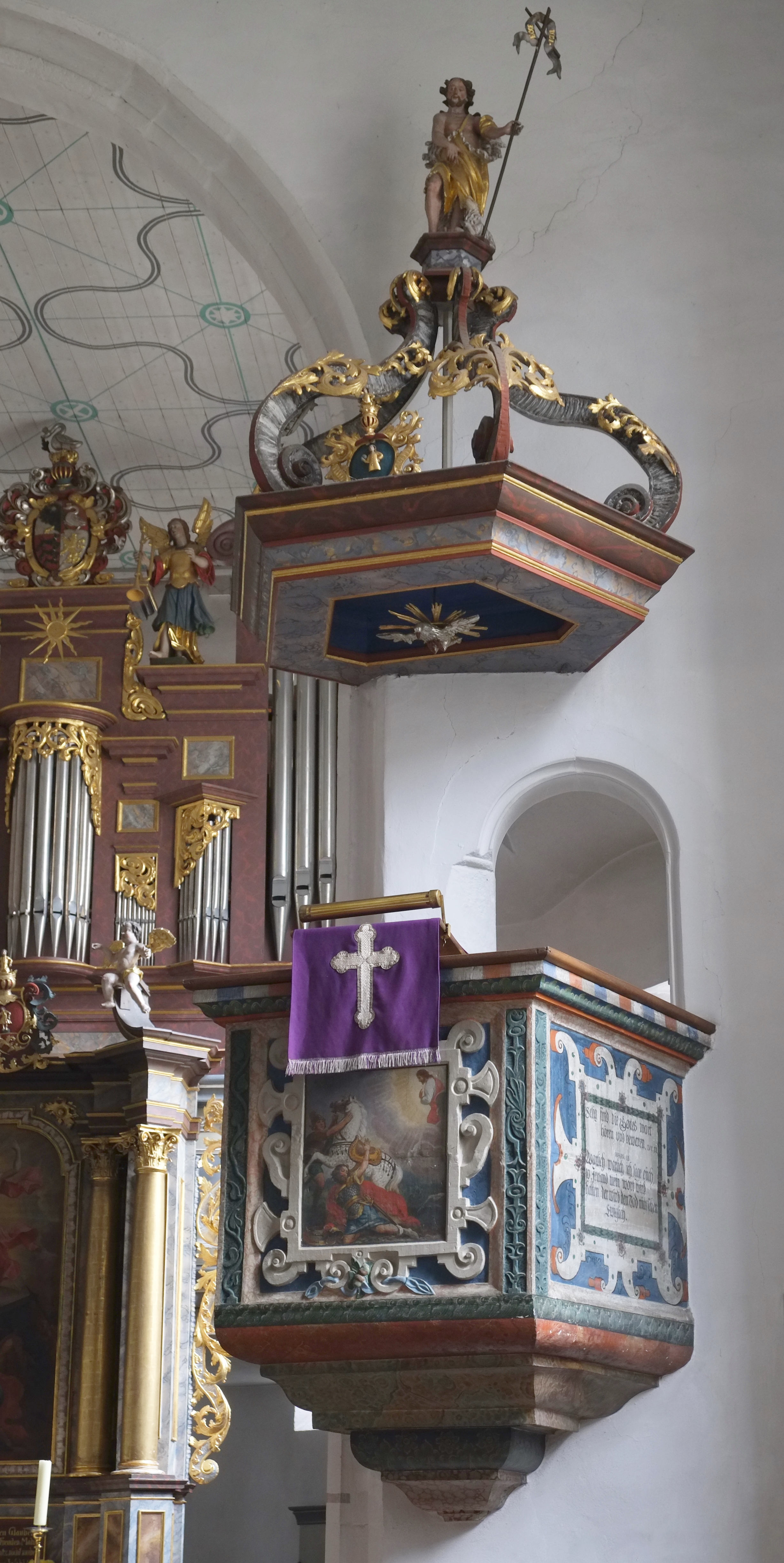 Evangelische Kirche in Prichsenstadt im Landkreis Kitzingen (Bayern, Deutschland)